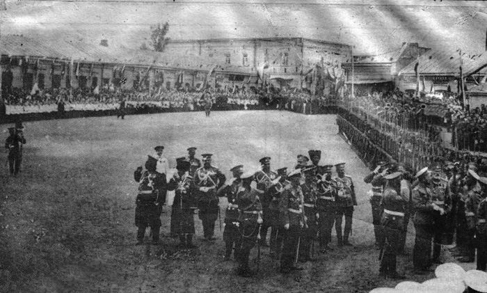 Приезд царя Николая II в город Овруч на открытие отреставрированной Васильевской церкви